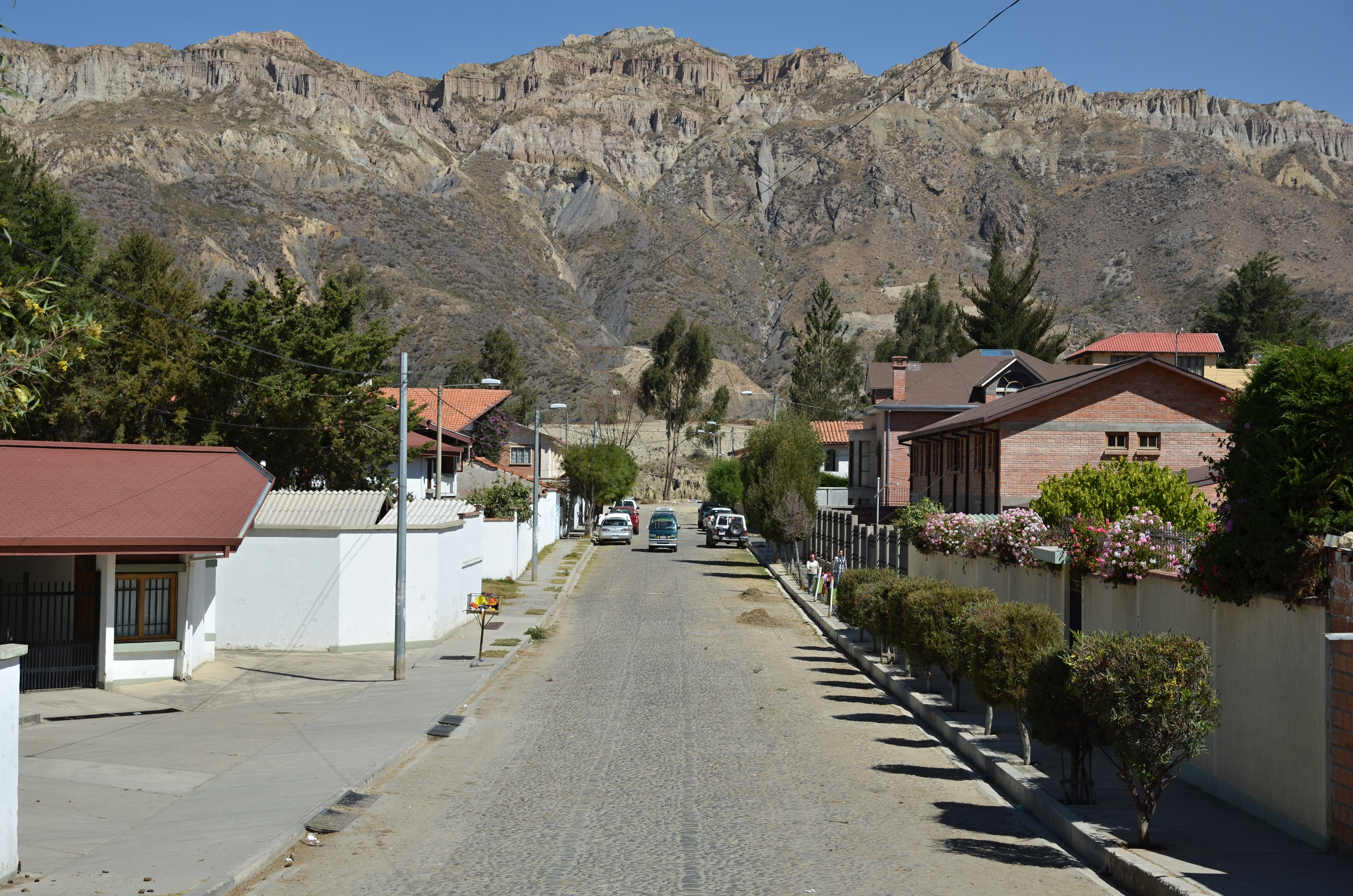 La Paz - Mallasa